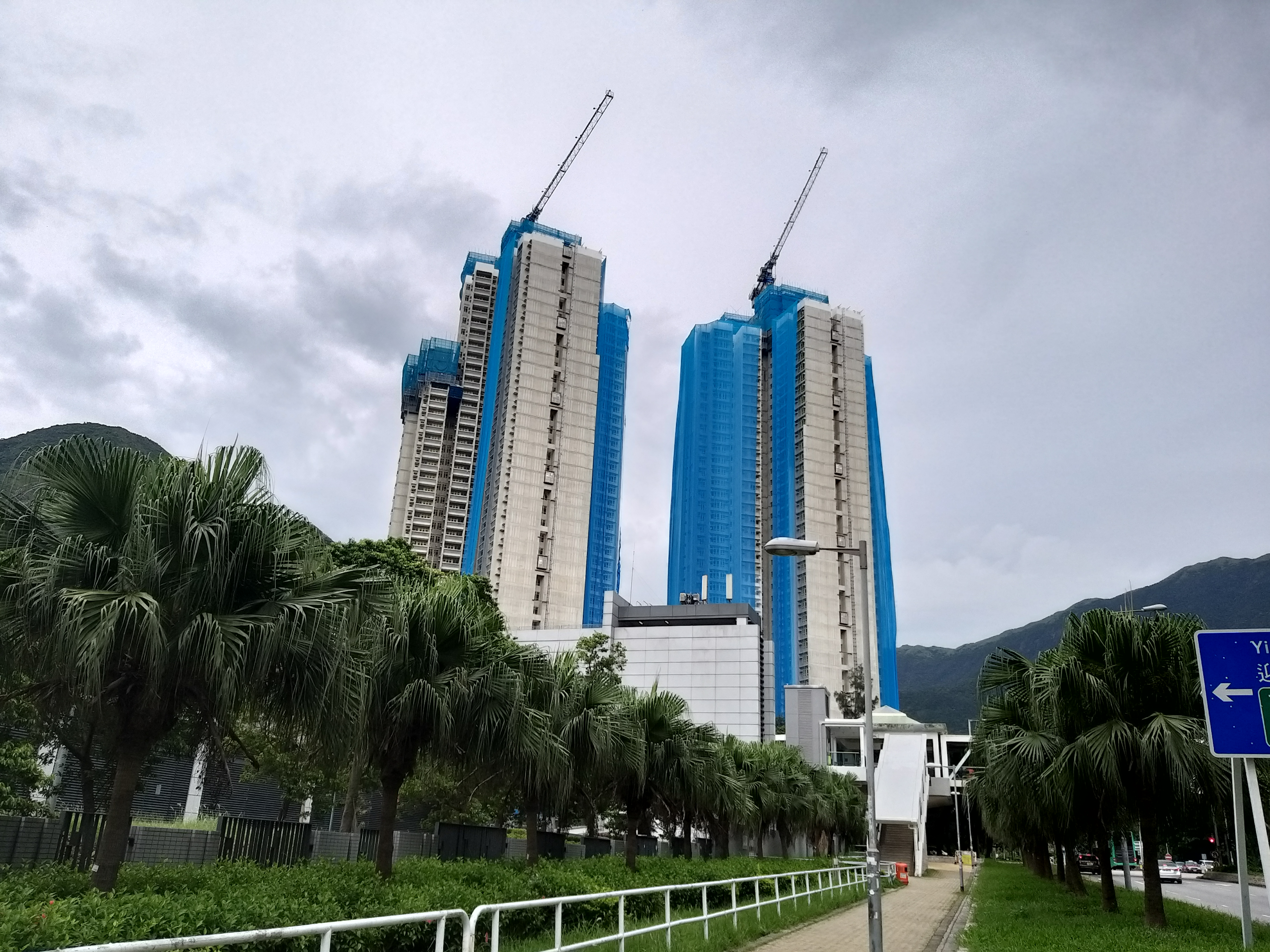 如圖所見，A座其中一面已完成一半噴漆工程，而其他位置亦已開始進行噴漆工作